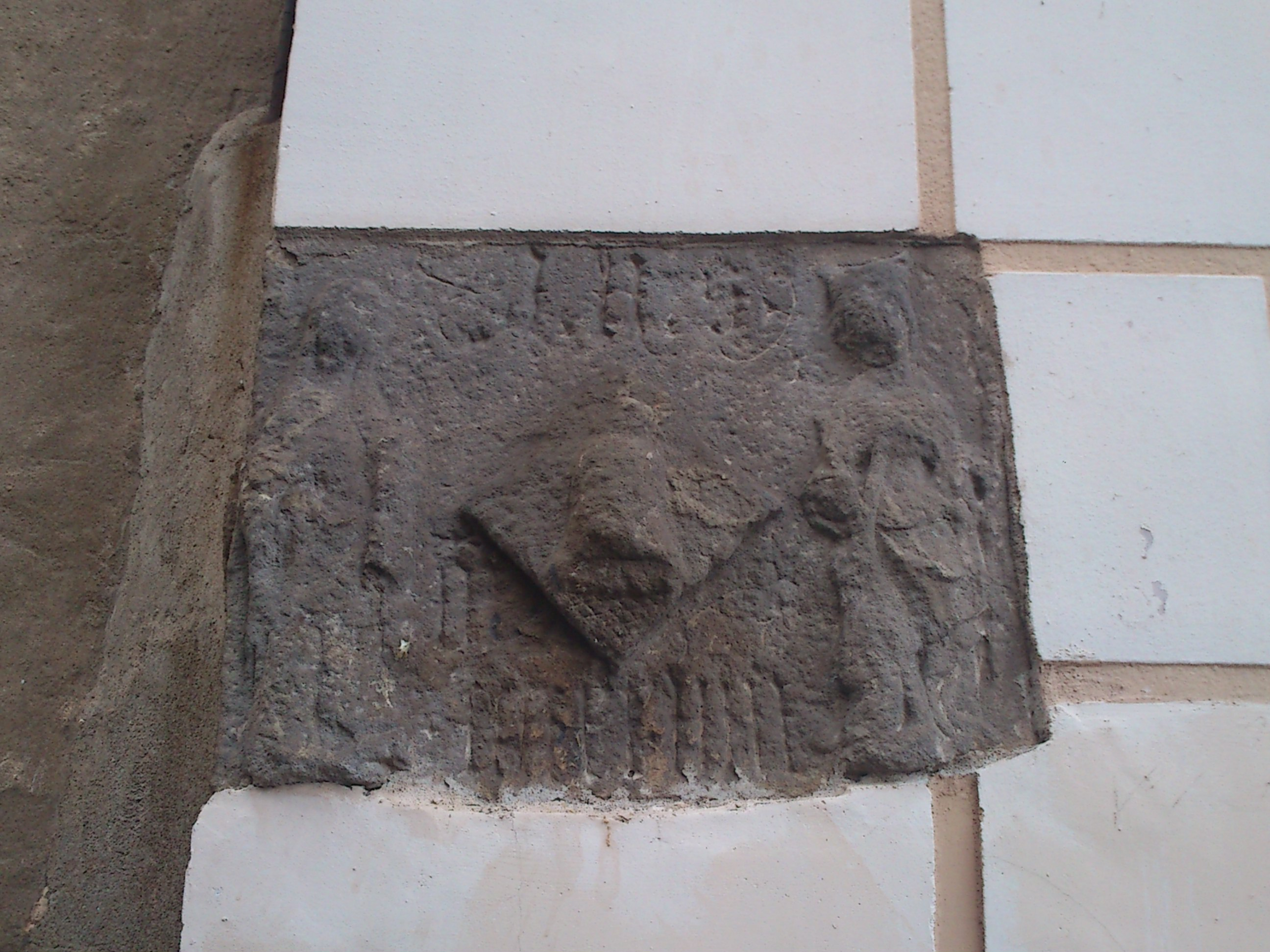 Escut de la família Santcliment, senyors de Badalona, situat en un extrem de la façana de la Torre Vella